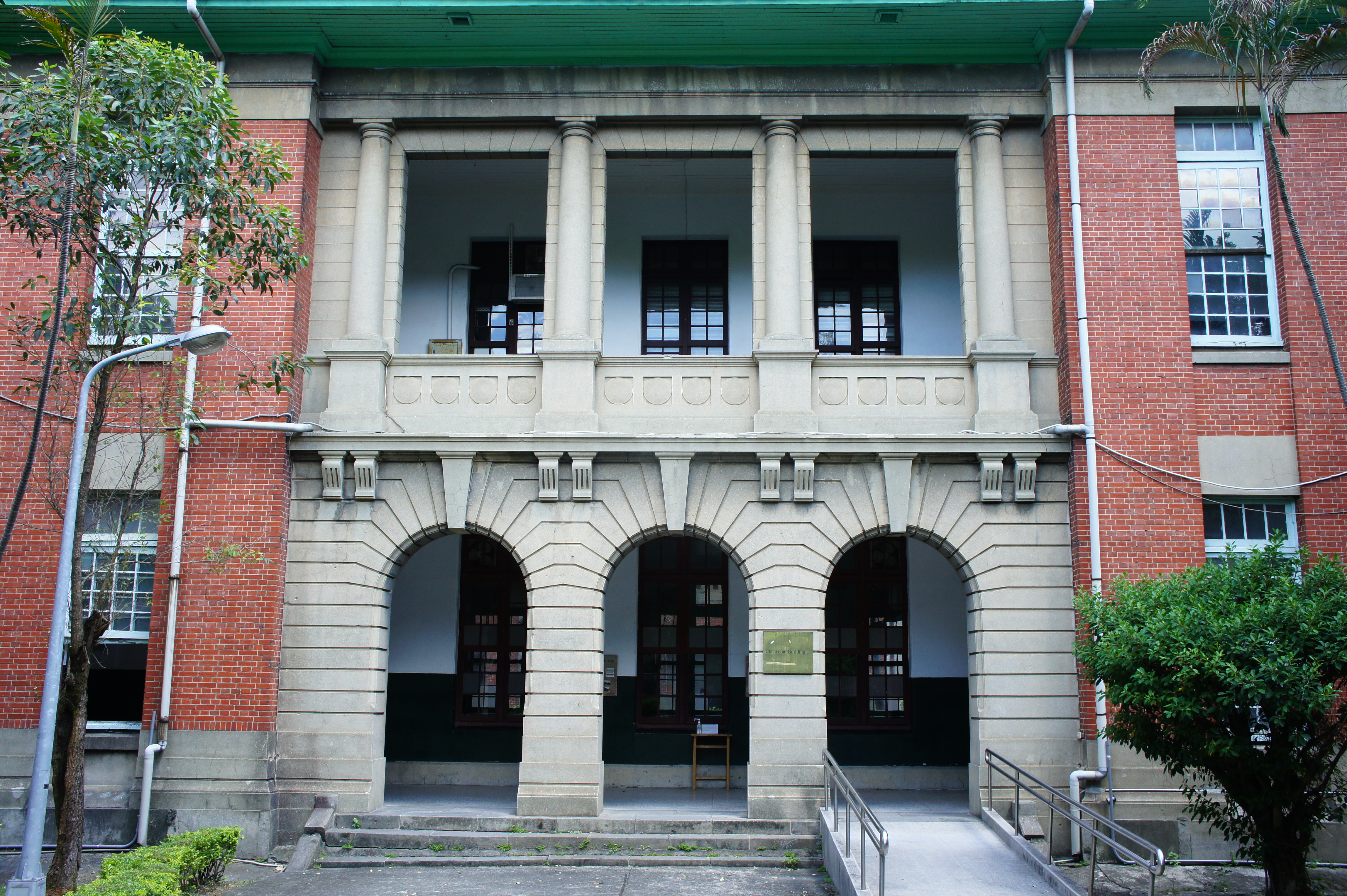 前身為1919年臺灣總督府高等商業學校，1947年1月7日併入臺大法學院，建築保有日治時期學院風的特色。